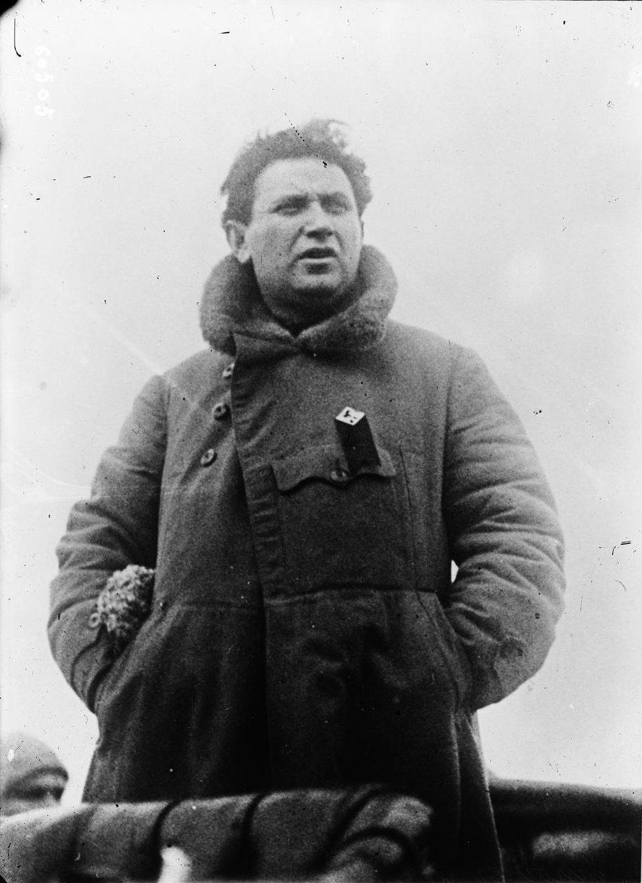 Диктатор Петрограда Зиновьев.